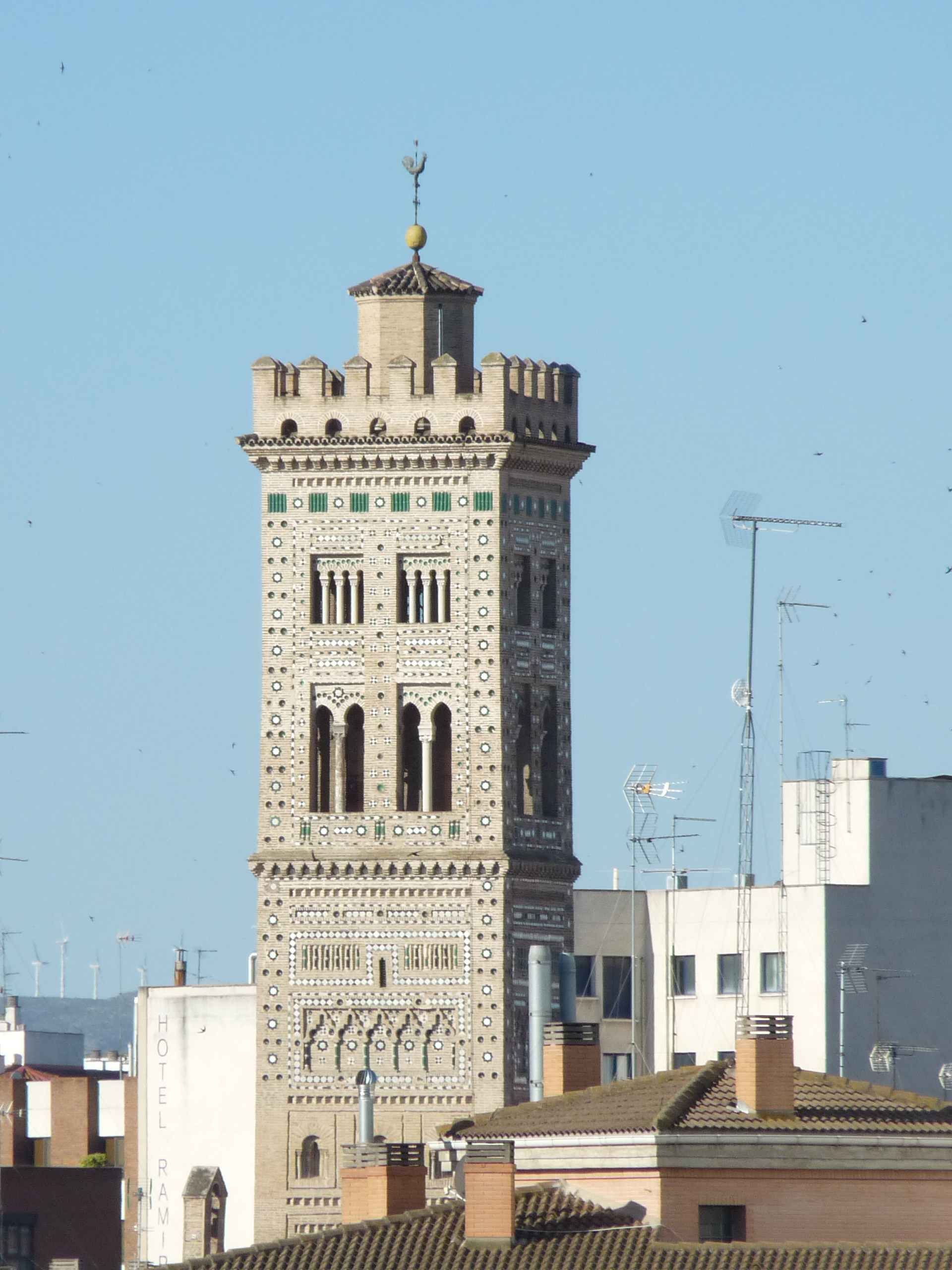 Zaragoza - Torre de la Madalena